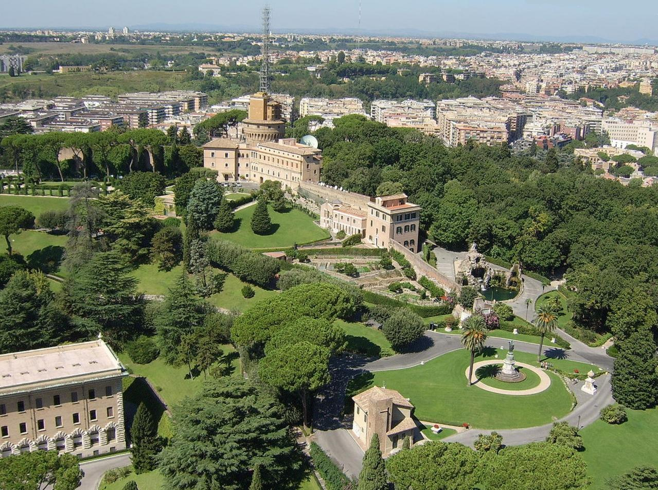 Radio Vatican Verwaltung mit Sendemast im September 2005.